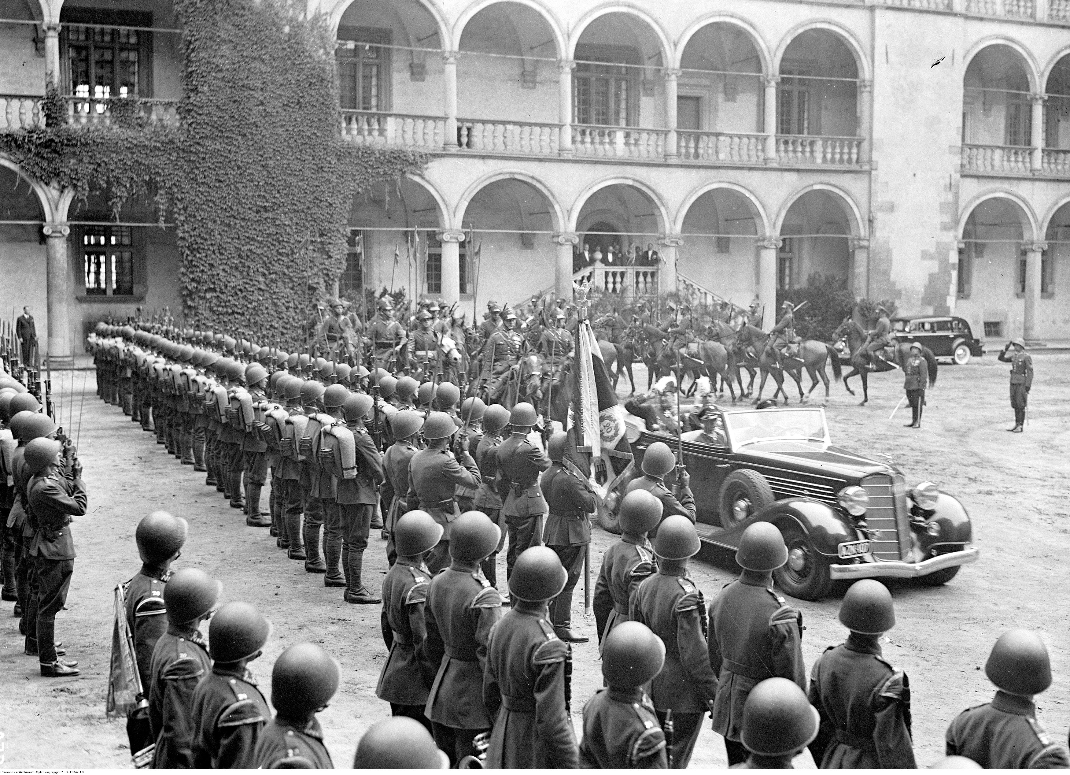 Wizyta ambasadora Włoch w Polsce Pietro Arone di Valentino w Krakowie połączona ze złożeniem listów uwierzytelniających prezydentowi RP Ignacemu Mościckiemu. Ambasador Włoch w Polsce Pietro Arone di Valentino (z lewej) i szef Protokołu Dyplomatycznego MSZ Karol Romer (z prawej) eskortowani przez szwadron honorowy 8 Pułku Ułanów księcia Józefa Poniatowskiego przejeżdżają samochodem przed kompanią honorową 20 Pułku Piechoty Ziemi Krakowskiej na dziedzińcu Wawelu; 20 lipca 1936. Koncern Ilustrowany Kurier Codzienny - Archiwum Ilustracji. Sygnatura: 1-D-1964-10